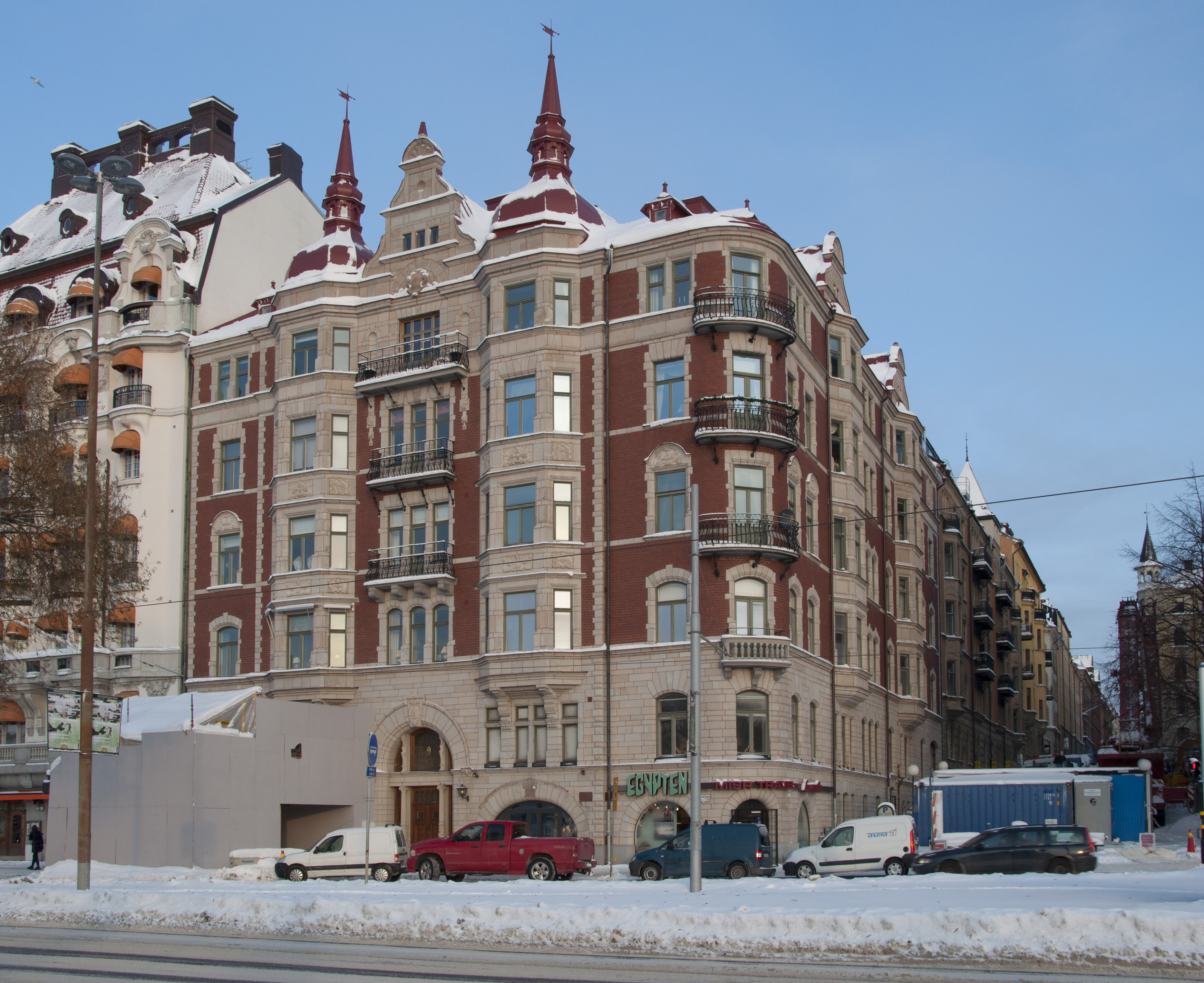 Strandvägen 9. Byggnadsår 1897-1900, arkitekt Johan Laurentz, byggherre och byggmästare N J Bengtsson.